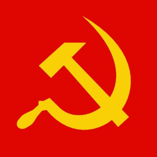 Символ коммунизма и социализма.